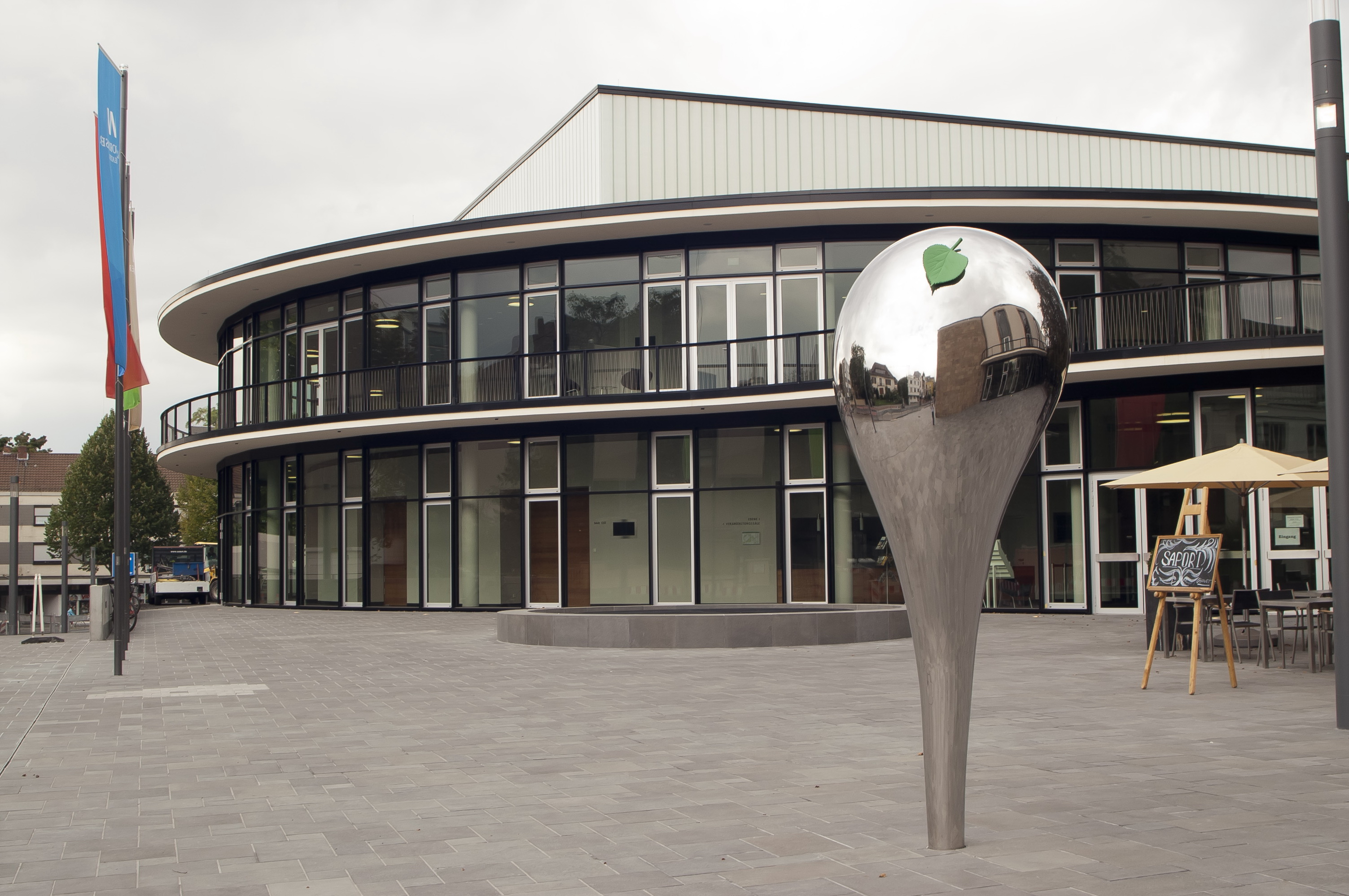 Städtisches Spiel- und Festhaus, Rathenaustraße 11, 1966, vgl. Liste der Kulturdenkmäler in Worms-Kernstadt